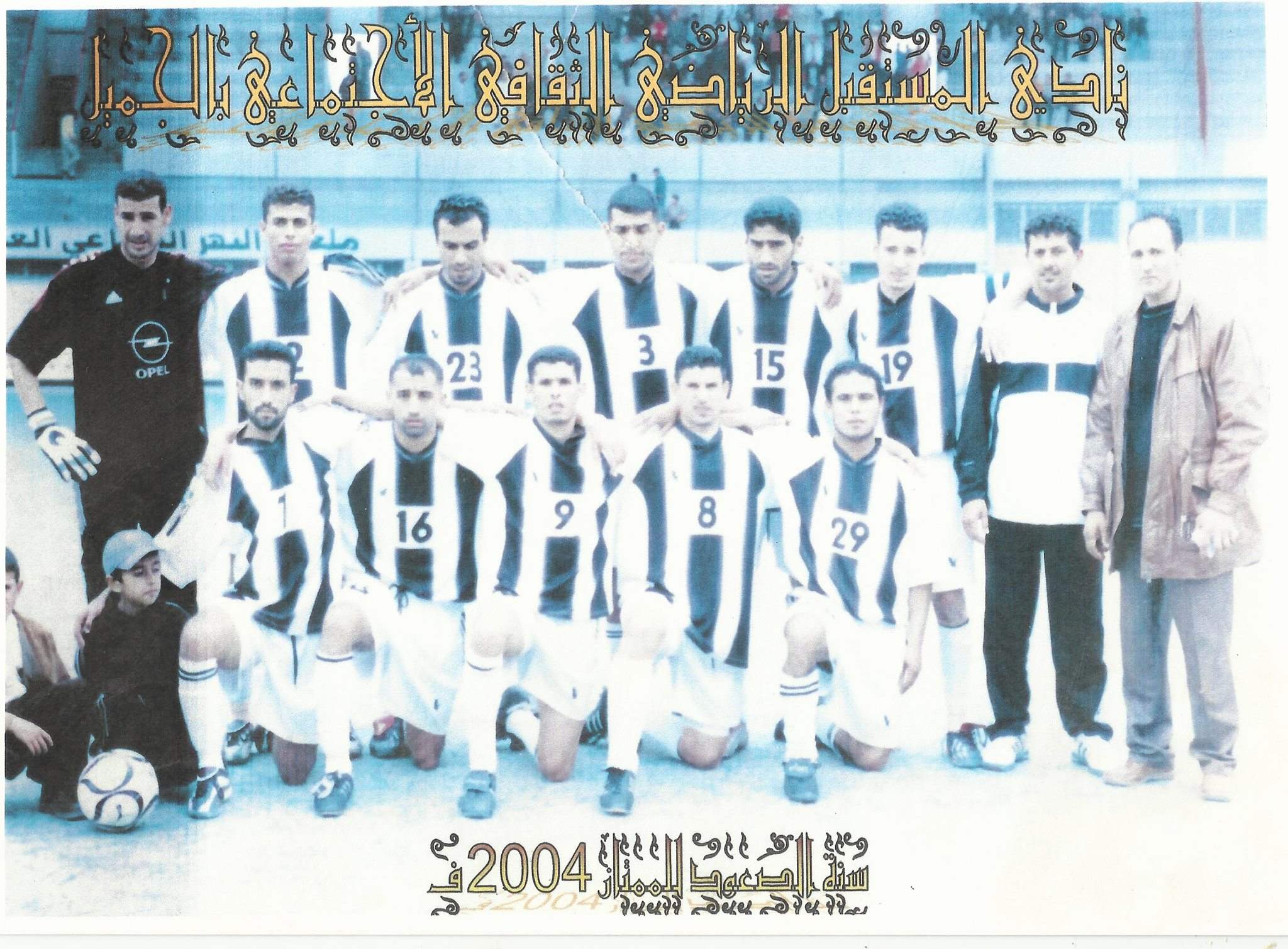 صورة لفريق الأول لنادي المستقبل بالجميل سنة 2004 موسم 2004-2005 موسم الصعود للدوري الليبي الممتاز